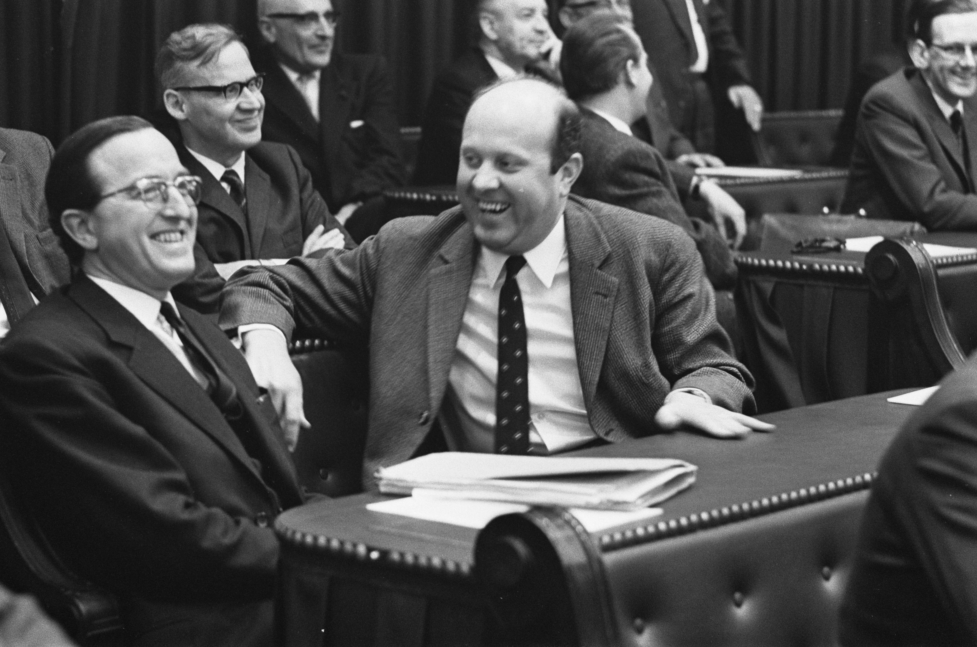 Collectie / Archief : Fotocollectie Anefo Reportage / Serie : [ onbekend ] Beschrijving : Afsplitsing van de Radicalen uit de KVP-fractie; de kamerleden Jacques Aarden (l), fractievoorzitter van de nieuwe Groep-Aarden, en Paul Janssen krijgen meteen een eigen bank in de Tweede Kamer Datum : 27 februari 1968 Locatie : Den Haag, Zuid-Holland Trefwoorden : parlementariër, politiek, politieke partijen Persoonsnaam : Aarden, J.M., Janssen, P.J. Fotograaf : Nijs, Jac. de / Anefo Auteursrechthebbende : Nationaal Archief Materiaalsoort : Negatief (zwart/wit) Nummer archiefinventaris : bekijk toegang 2.24.01.05 Bestanddeelnummer : 921-1177